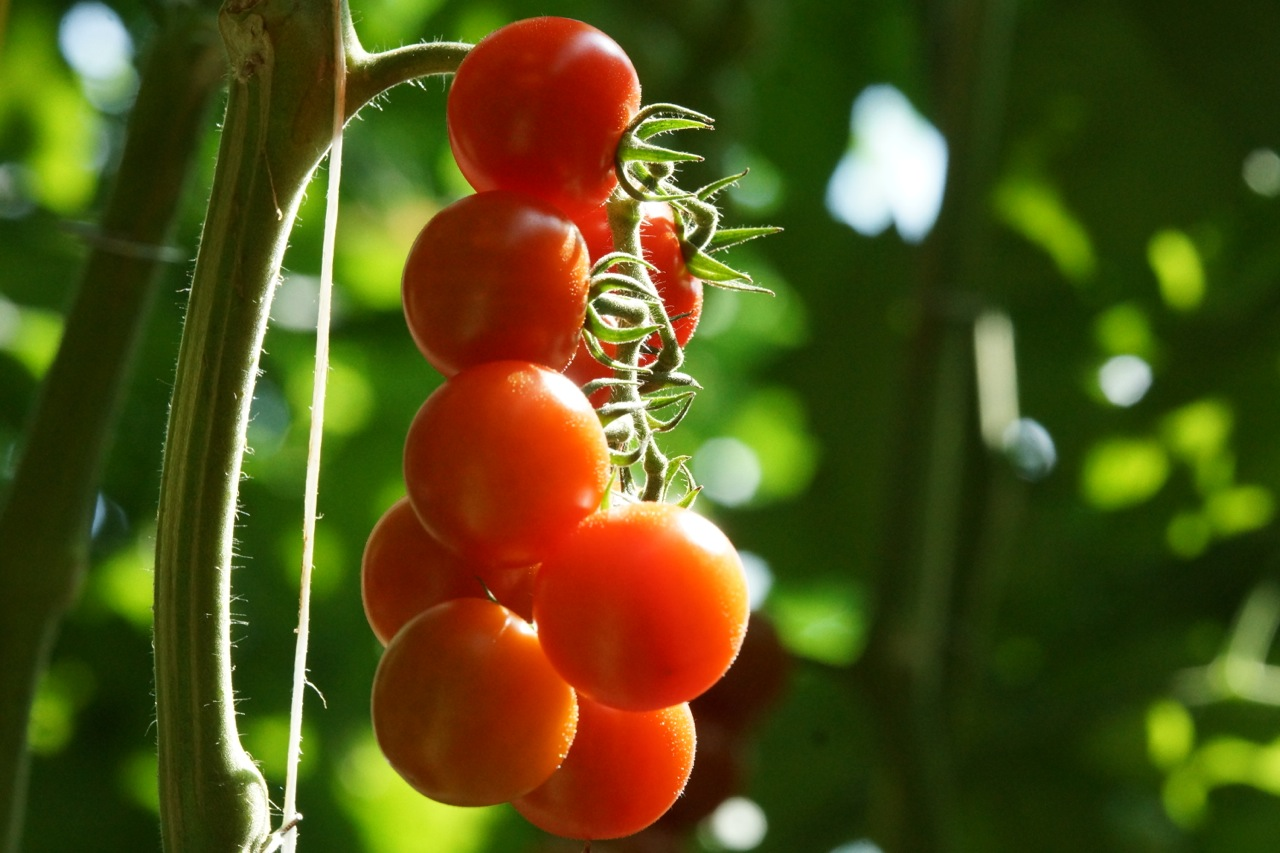 Pomodoro ciliegino tipo Pachino a grappolo coltivato nel Piano di Magadino in Canton Ticino in Svizzera.